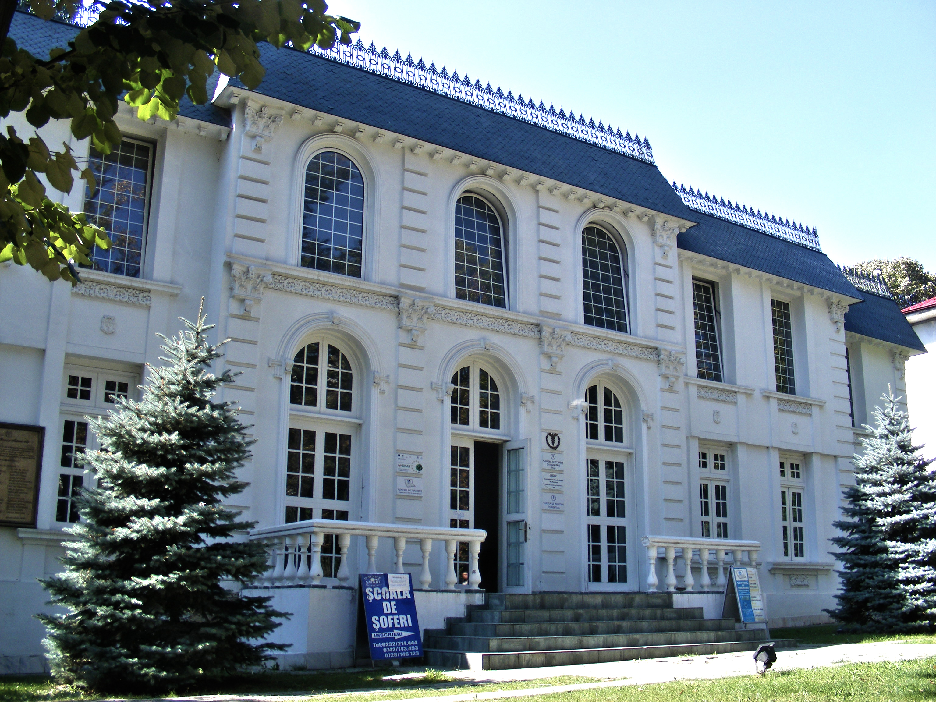 Casa Sturdza- E. Diaconescu, azi Sediul Camera de Comerț